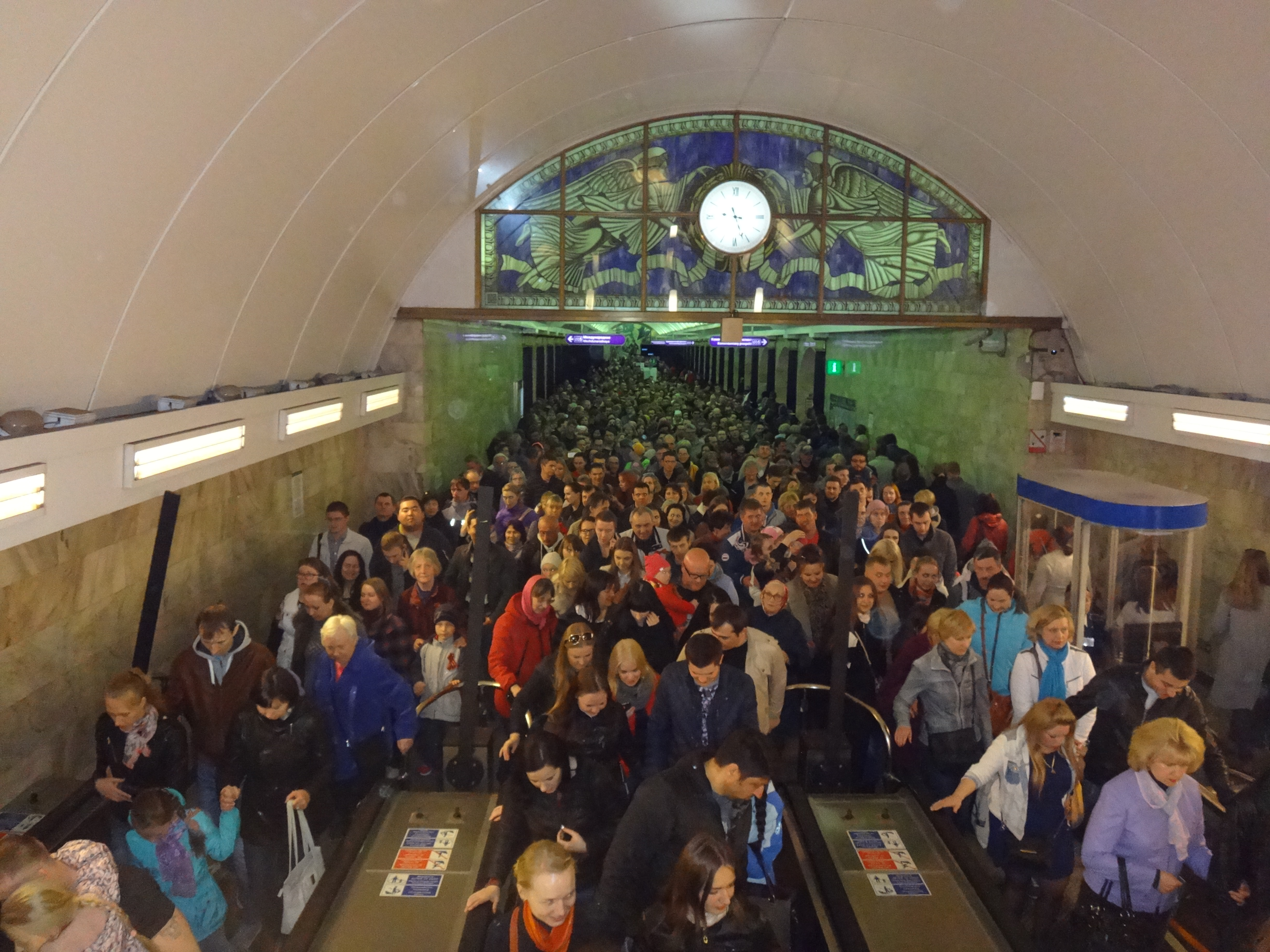 Идём на салют